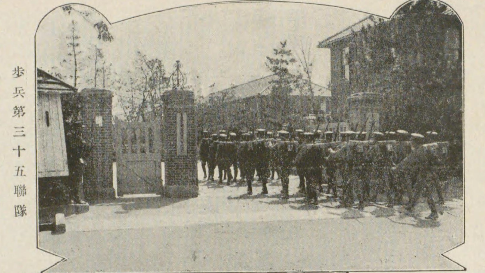 歩兵第三十五聯隊。現在の富山大学五福キャンパス正門附近。